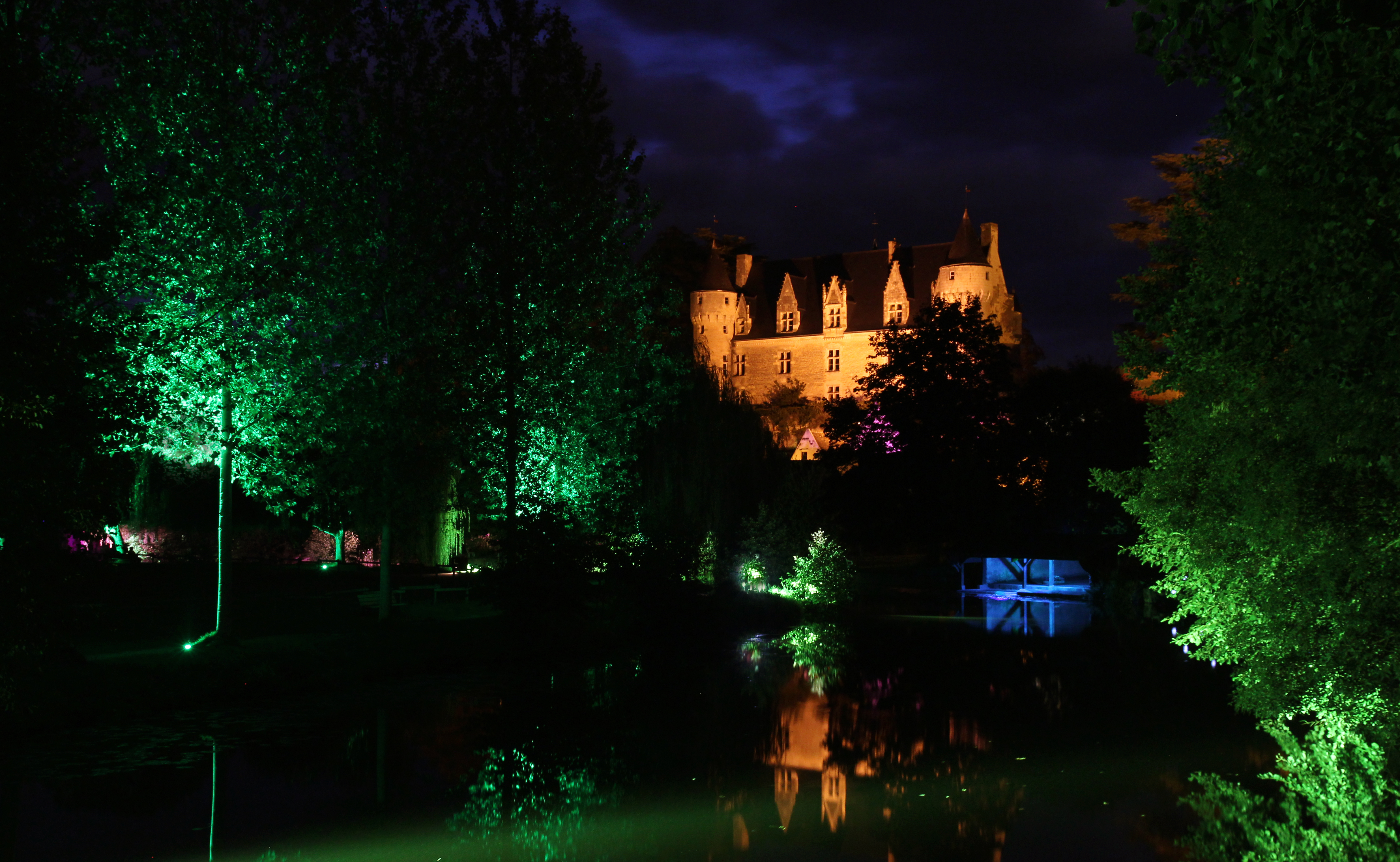 Vue nocturne de Montrésor.